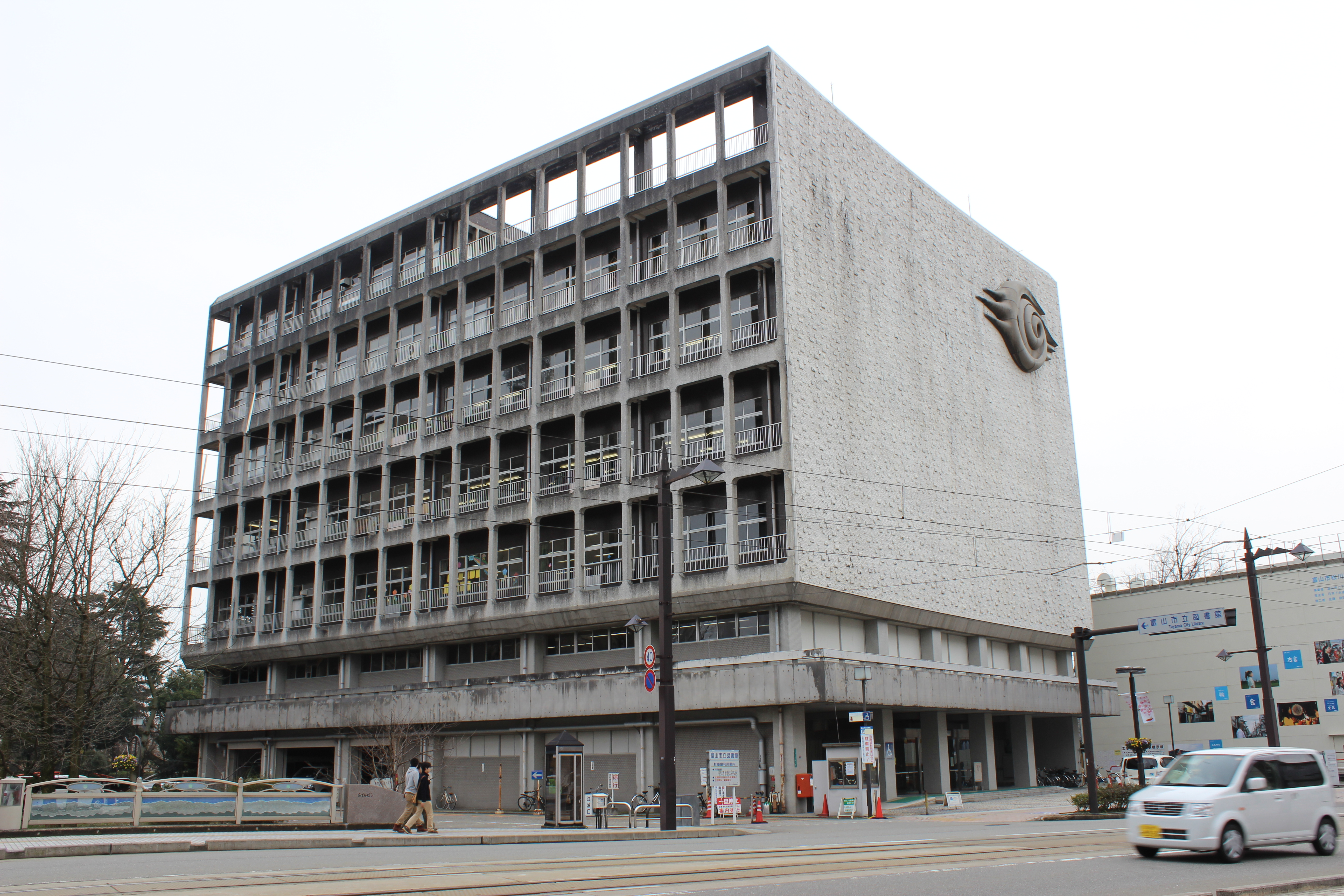 富山市立図書館 旧本館 富山県富山市丸ノ内1丁目4-50